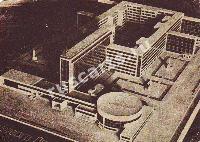 Открытка предположительно 1935 года, макет по проекту Ильи Голосова